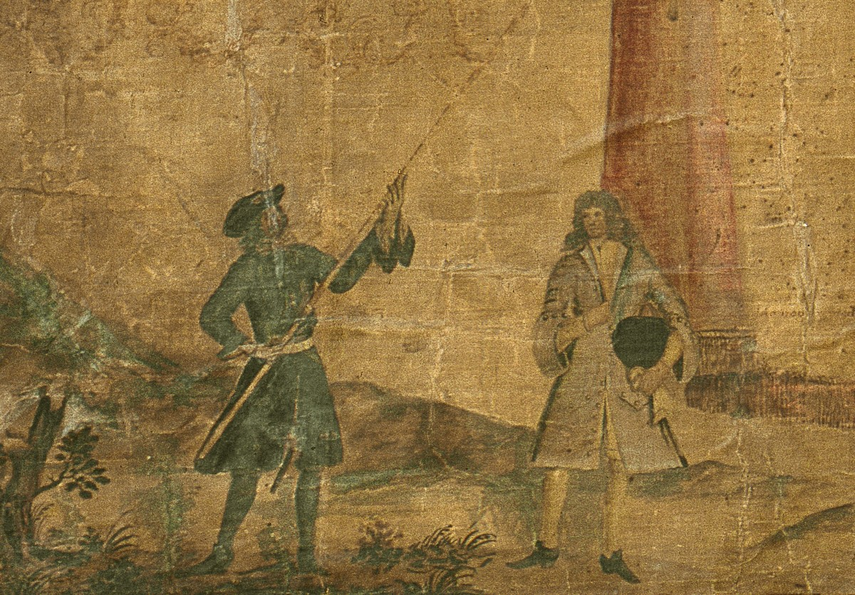 Gripenhielms Mälarkarta detalj visnad Gripenhielm (höger) och en lantmätare